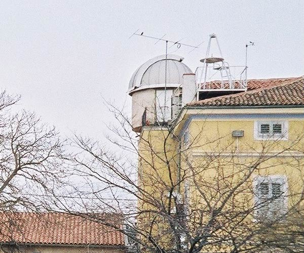 Visnjan Observatroy